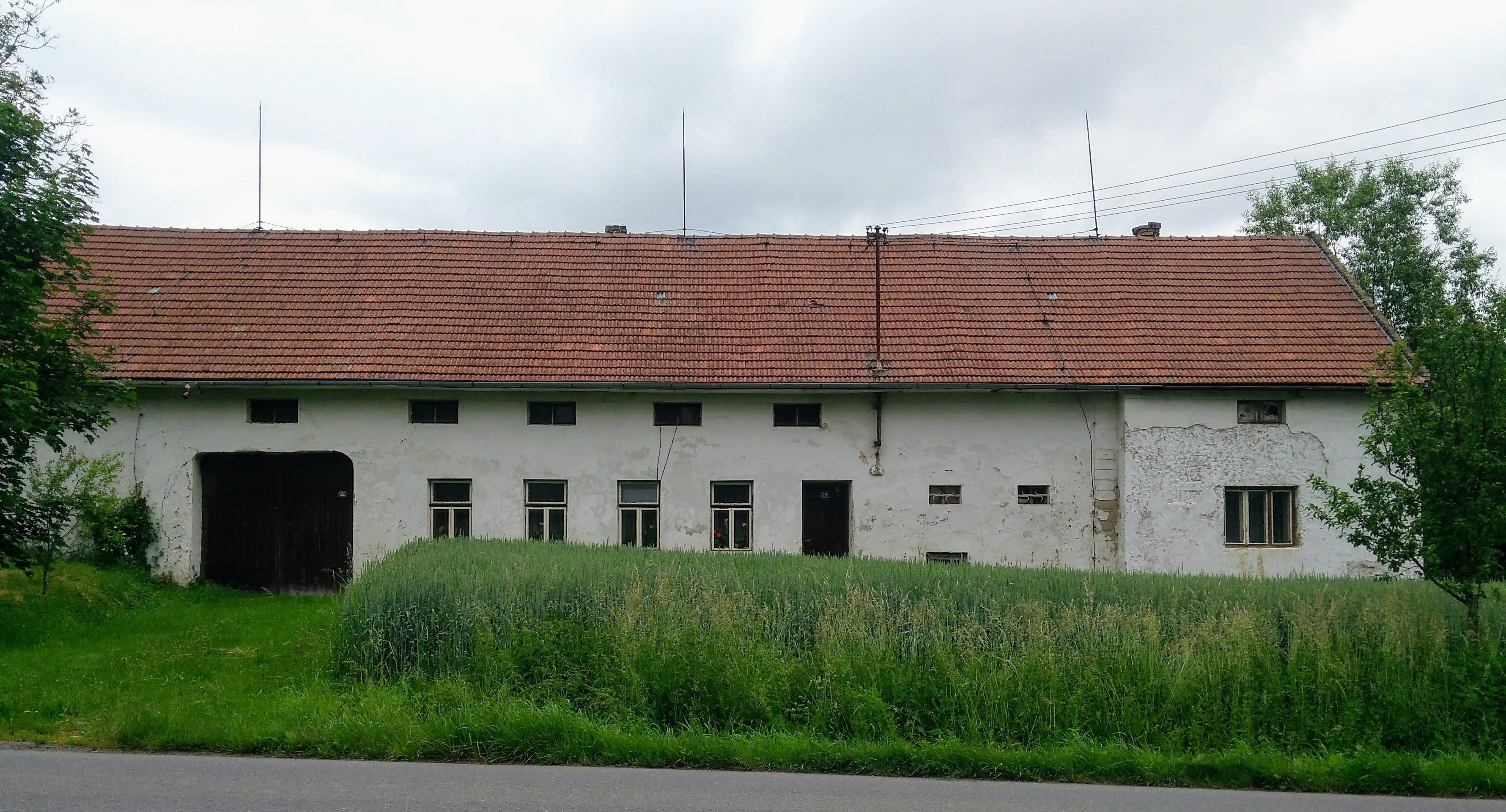 Zlámanka č.p. 29 v lokalitě Trňák - bývalý mlýn na toku Trňák pravostraném přítoku Kotojetky